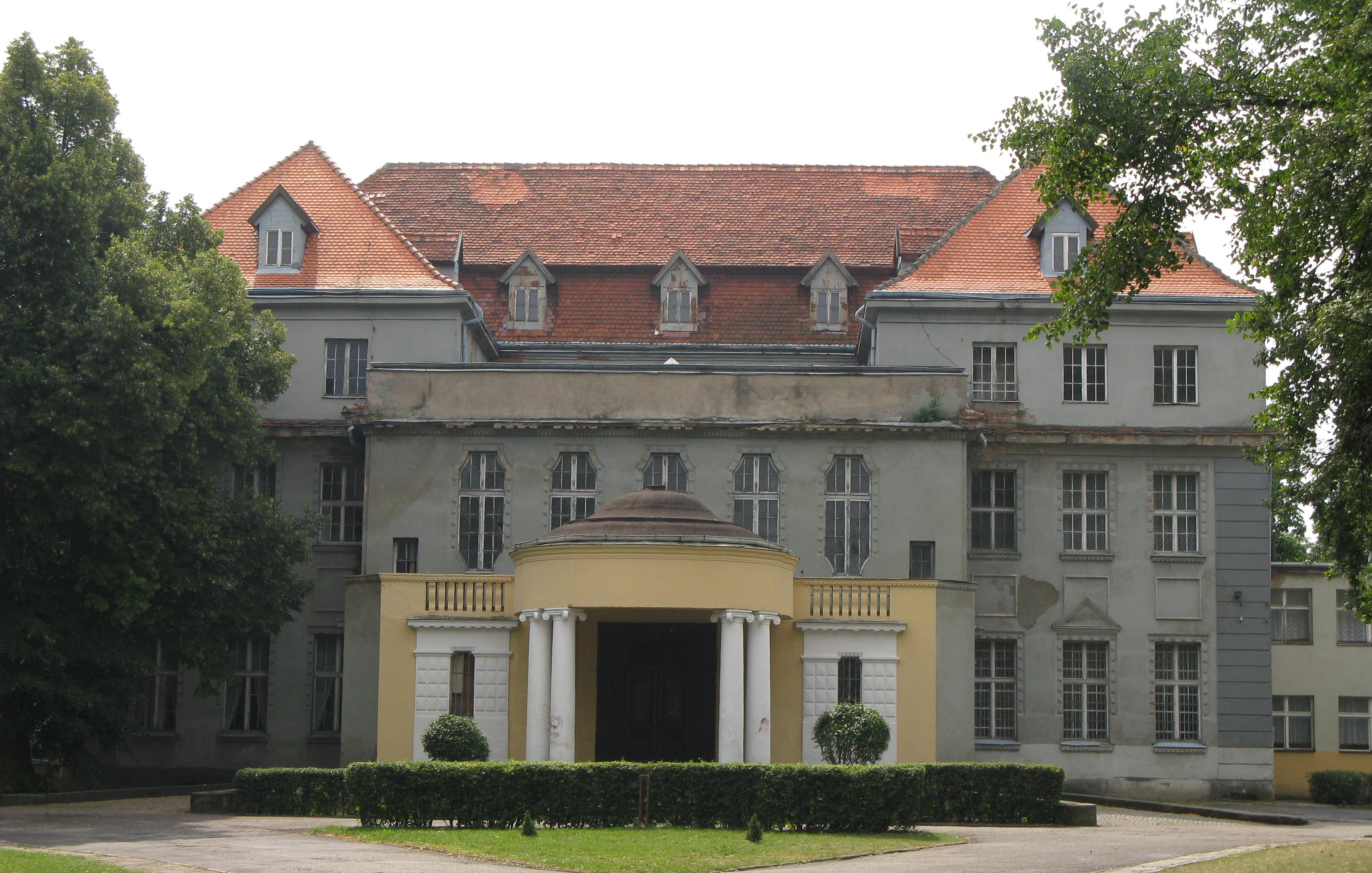 Zespół pałacowy Wolffów w Gronowie